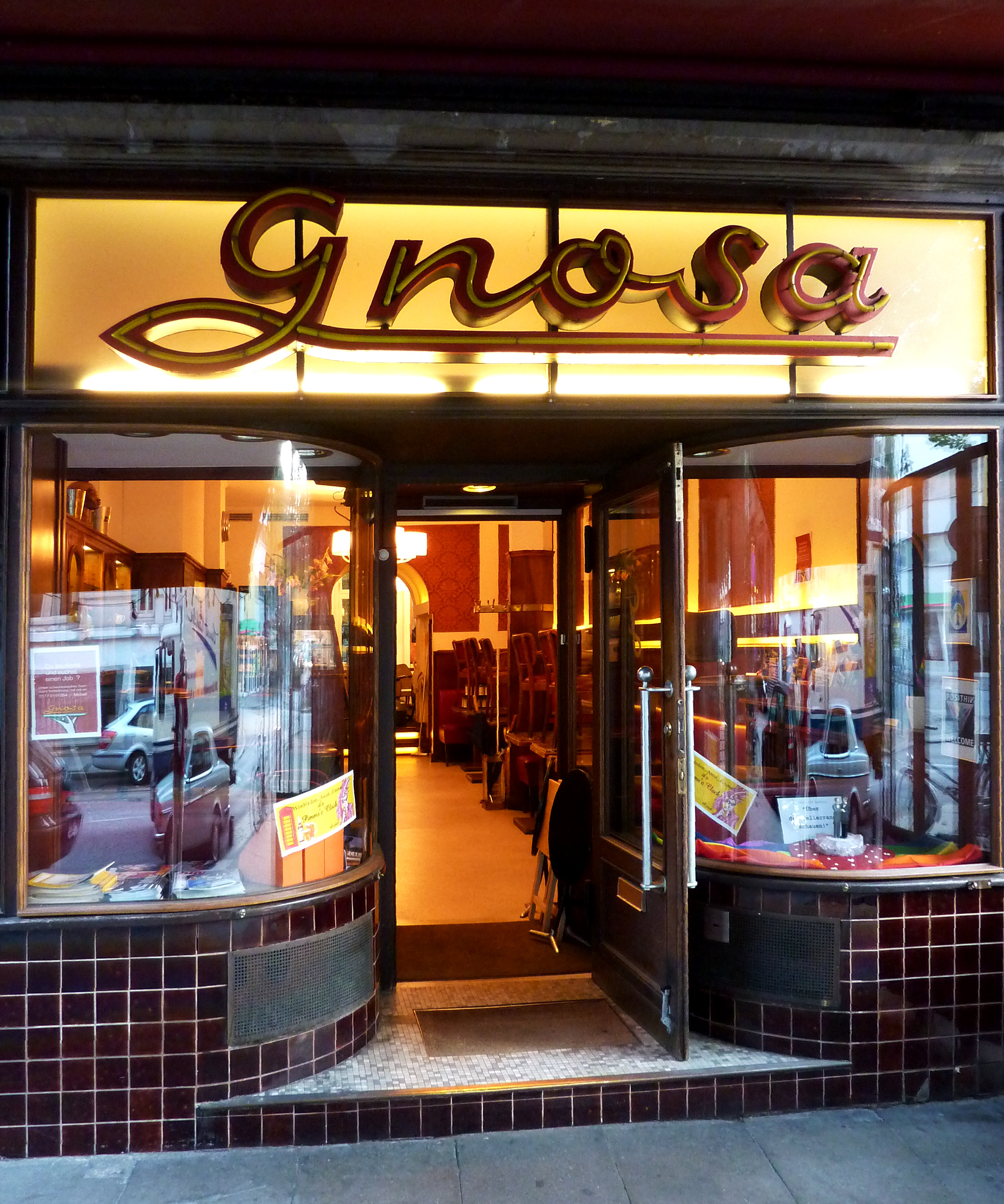 Gnosa, ein Schwulen- und Lesben-Cafe in der Langen Reihe von Hamburg-St. Georg.